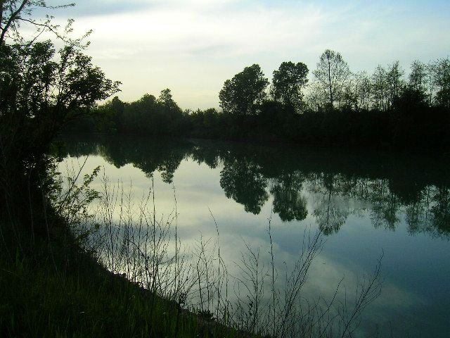 Foto scattata da me medesimo il 27.04.2006 a Noventa di Piave (VE). Fiume Piave, vista verso S.